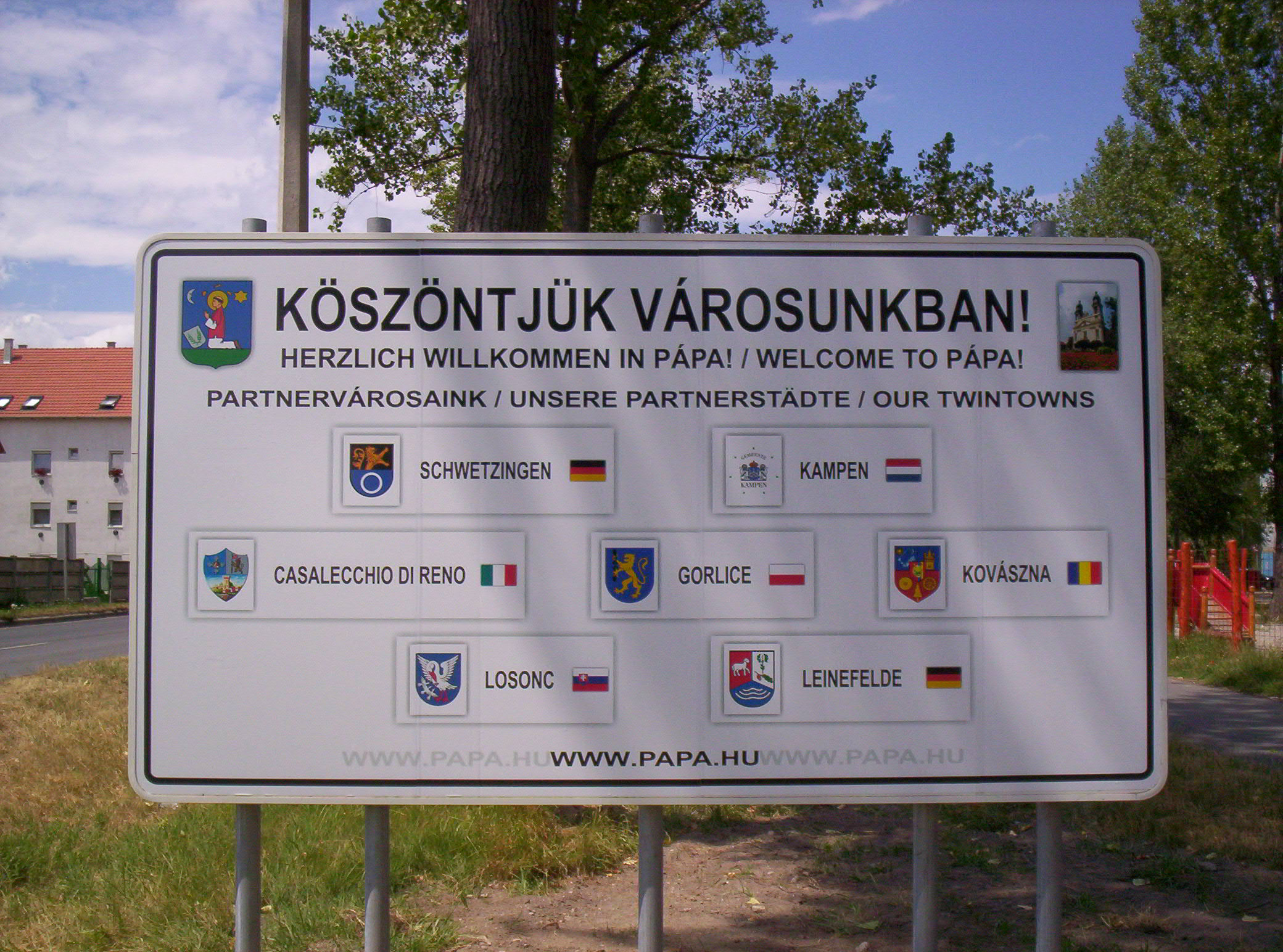 Twin towns of Pápa on a sign at the edge of town.Pápa testvérvárosai a város szélén elhelyezett táblán.